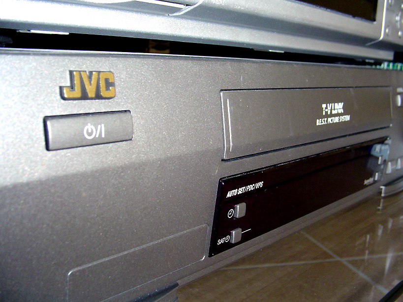 JVC (electronicabedrijf) VHS-systeem